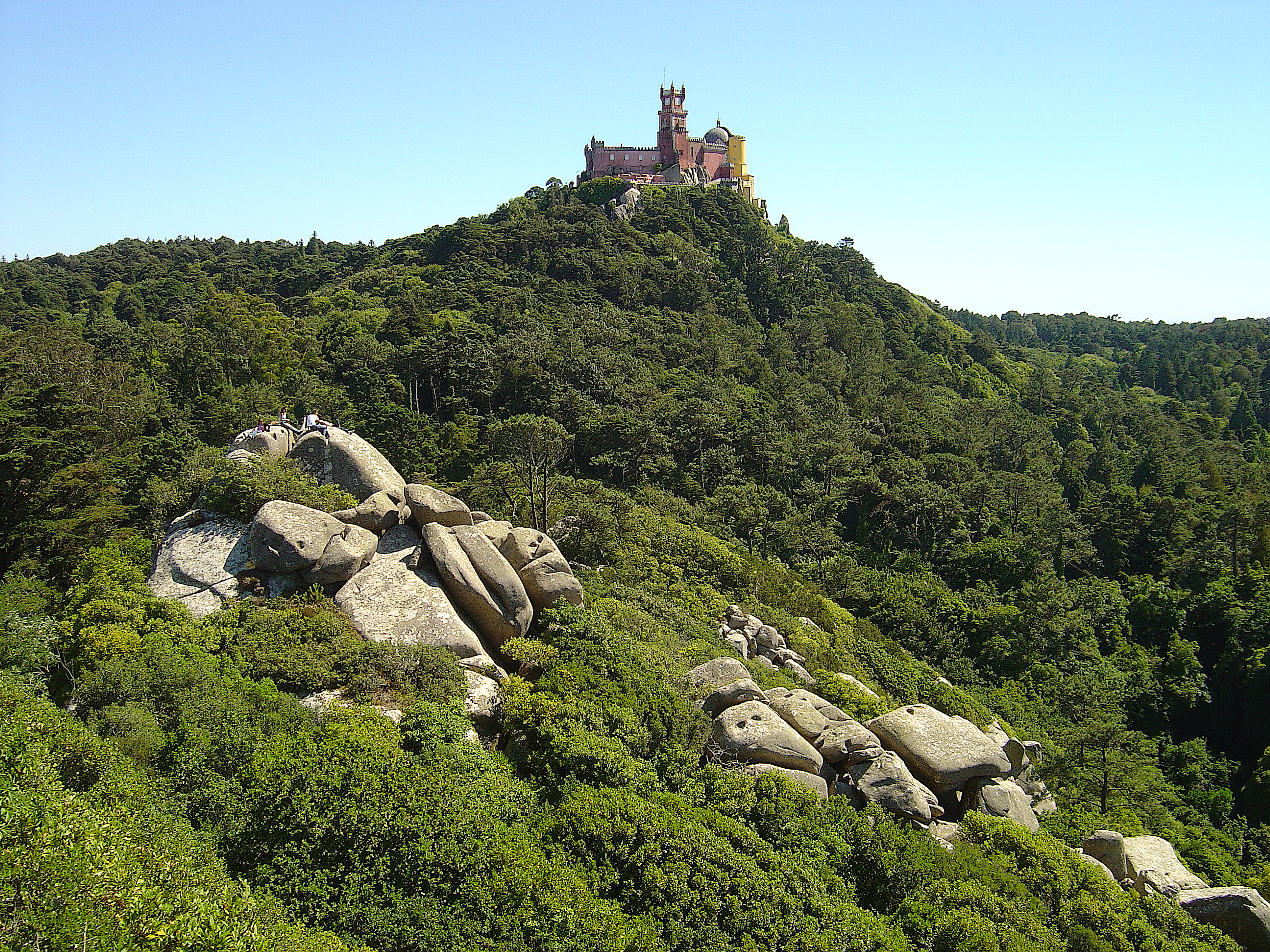 Palácio da Pena - Sintra (Portugal)